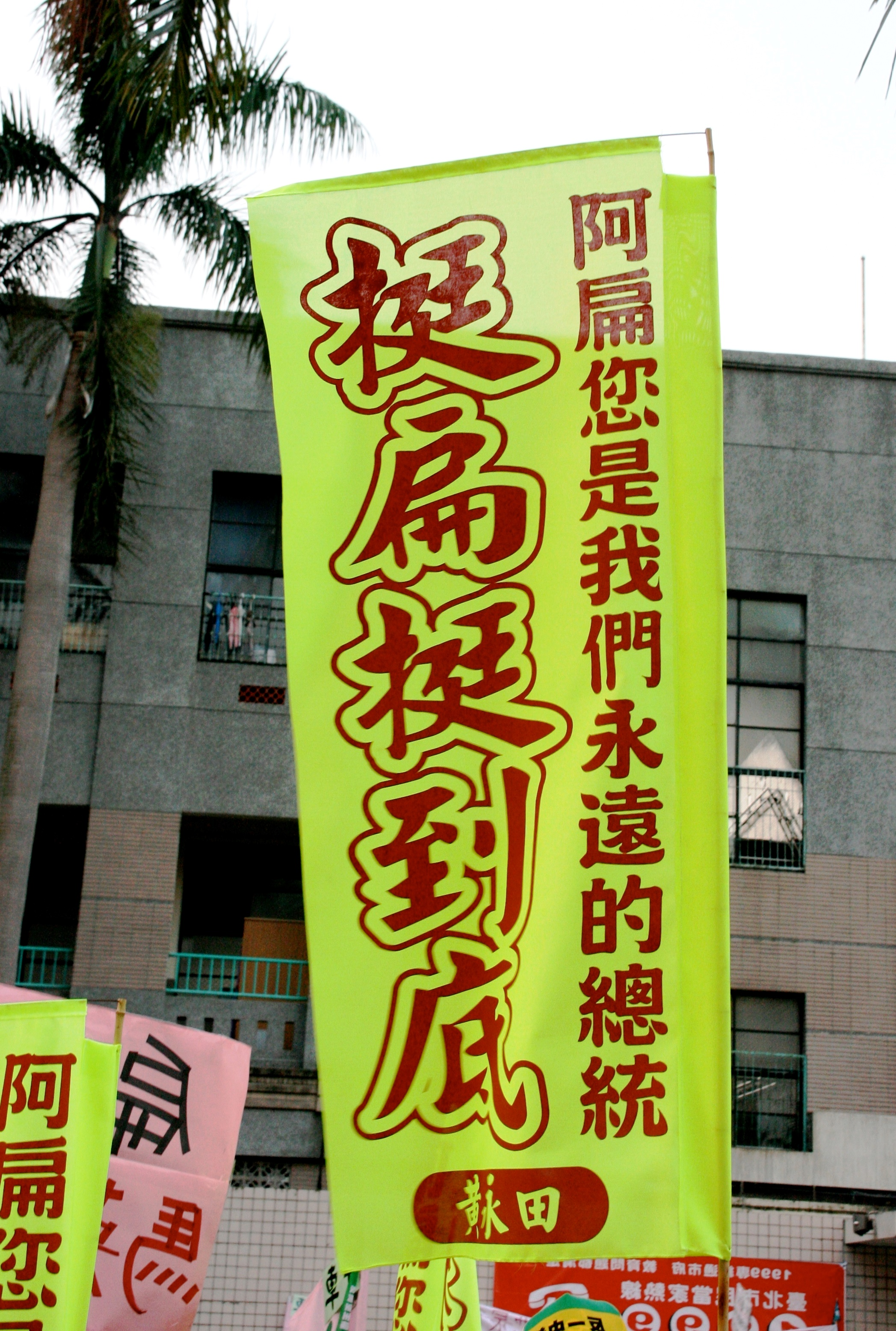 1025反黑心顧台灣大遊行台大線，支持中華民國前總統陳水扁的台南市阿扁之友會會長黃永田的旗幟。